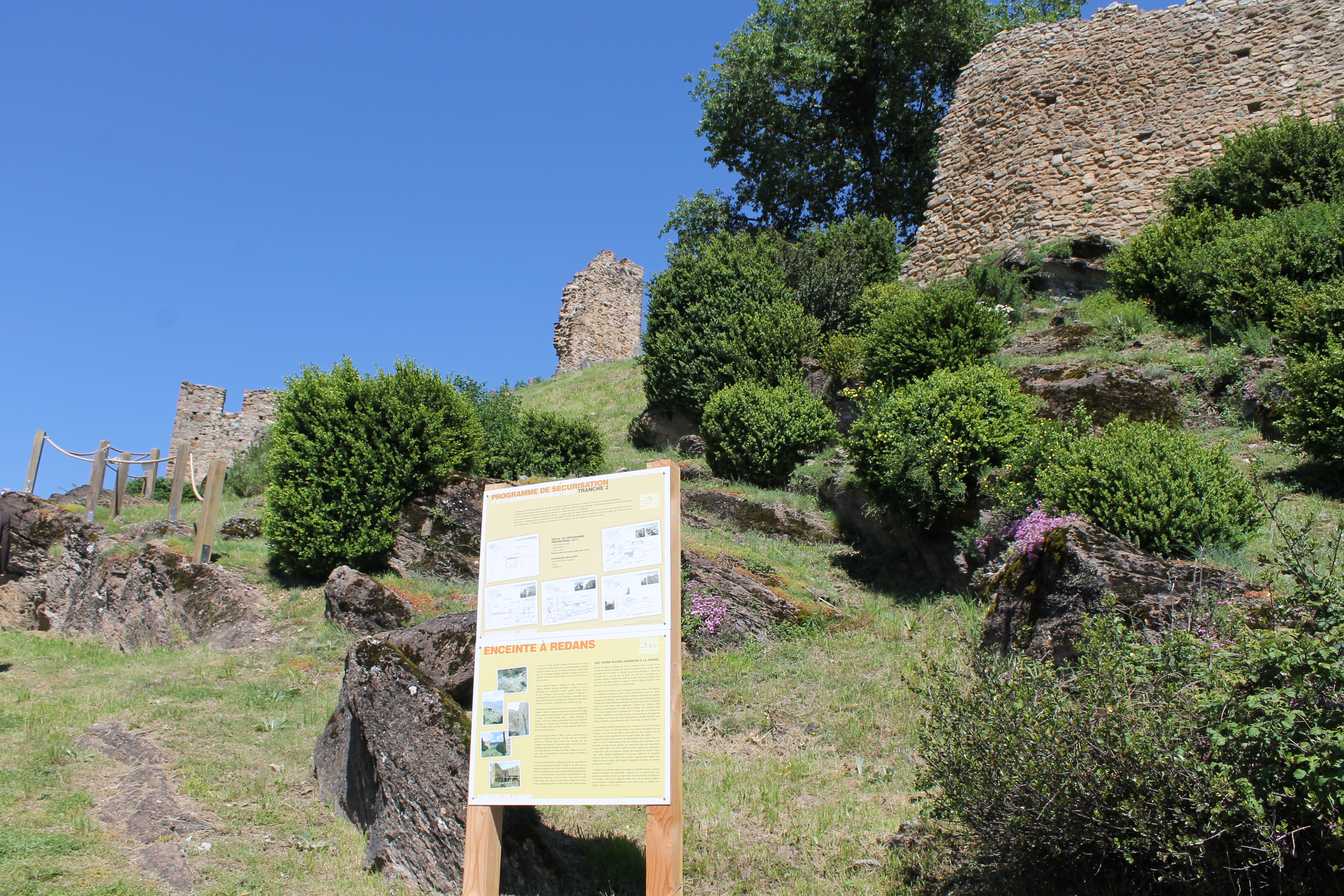 Renouvellement du site du château de Lordat. Cette photo a été prise lors de la journée d'inauguration de la ré-ouverture du château le 7 juin 2016.